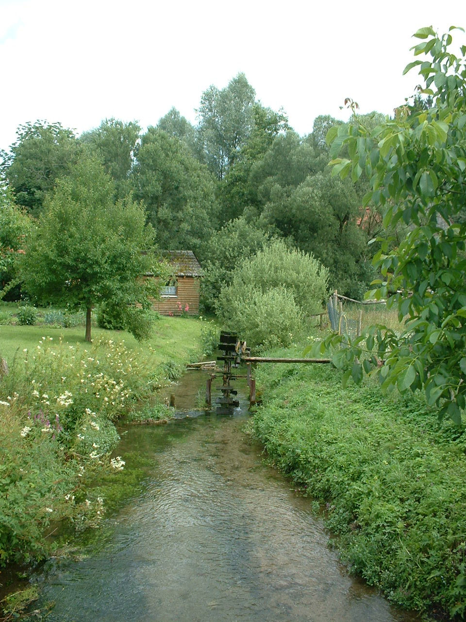 Wiesent river in Treunitz near Bamberg (Franconia)